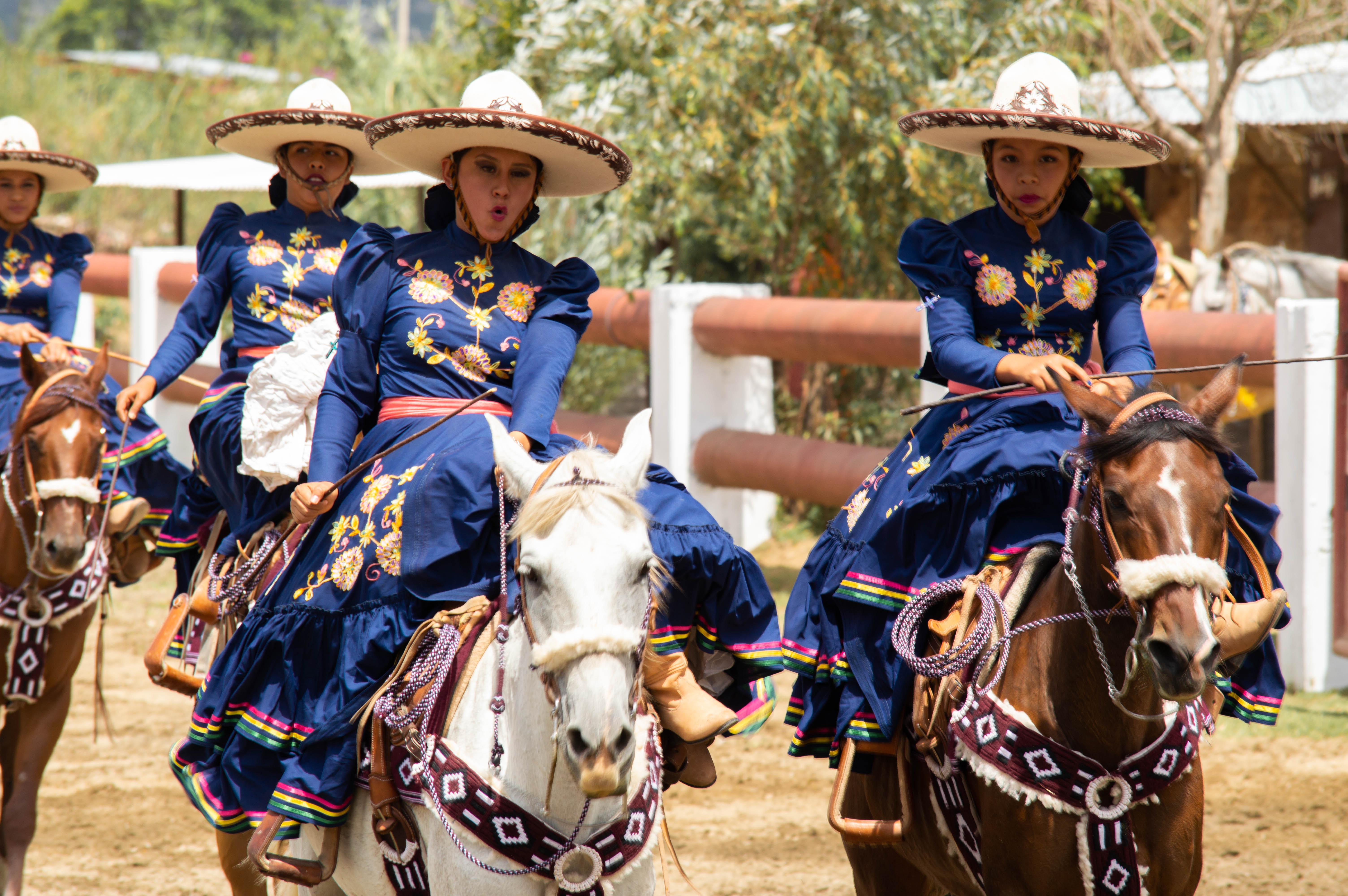 Muestra del equipo de las escaramuzas del Lienzo Charro de Soledad Etla, Oaxaca.